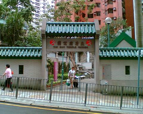 銅鑼灣天后廟入口